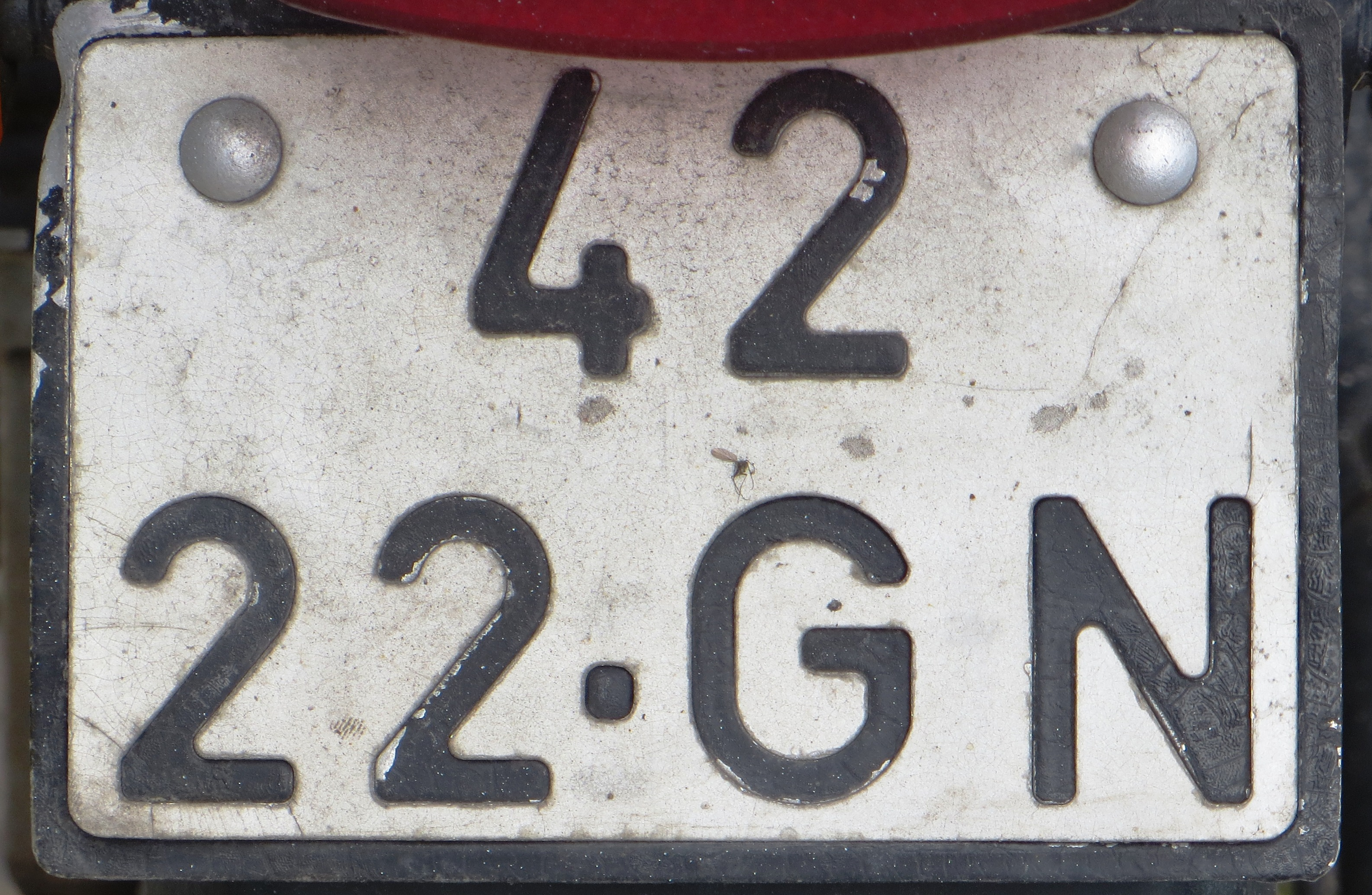 Motorfiets kenteken Portugal